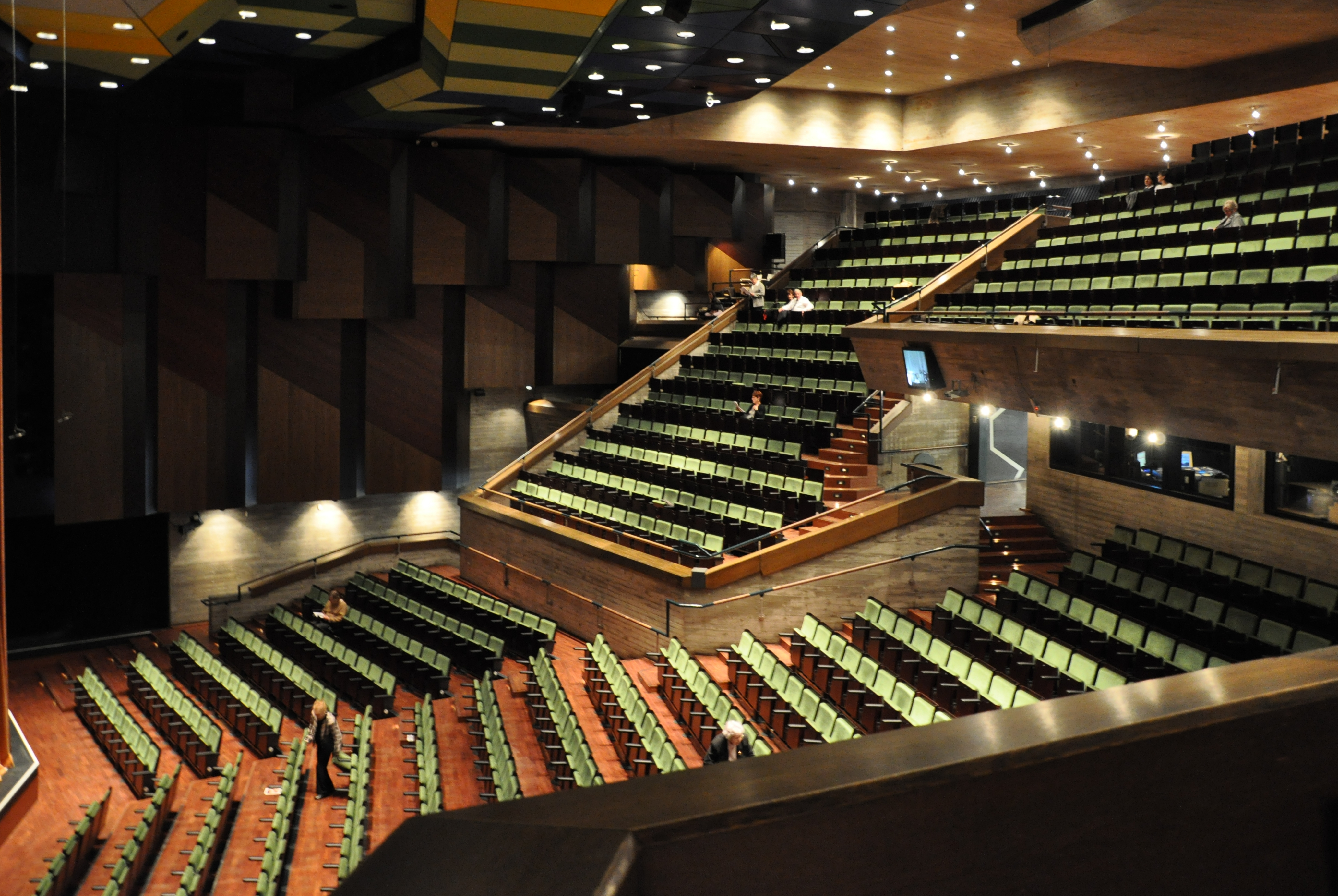 Karlsruhe, Badisches Staatstheater, Großes Haus